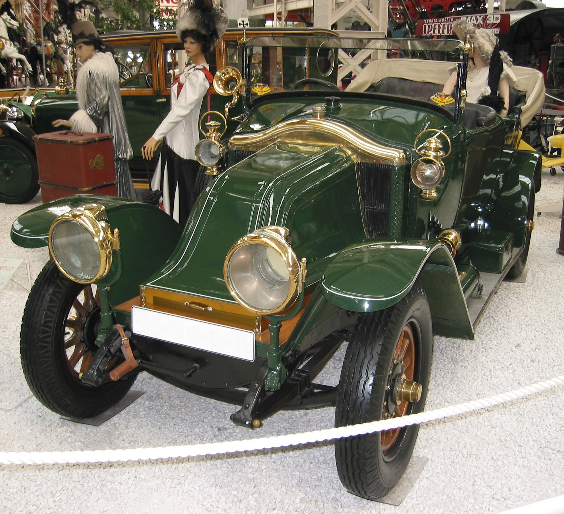 Renault Type EU Torpedo